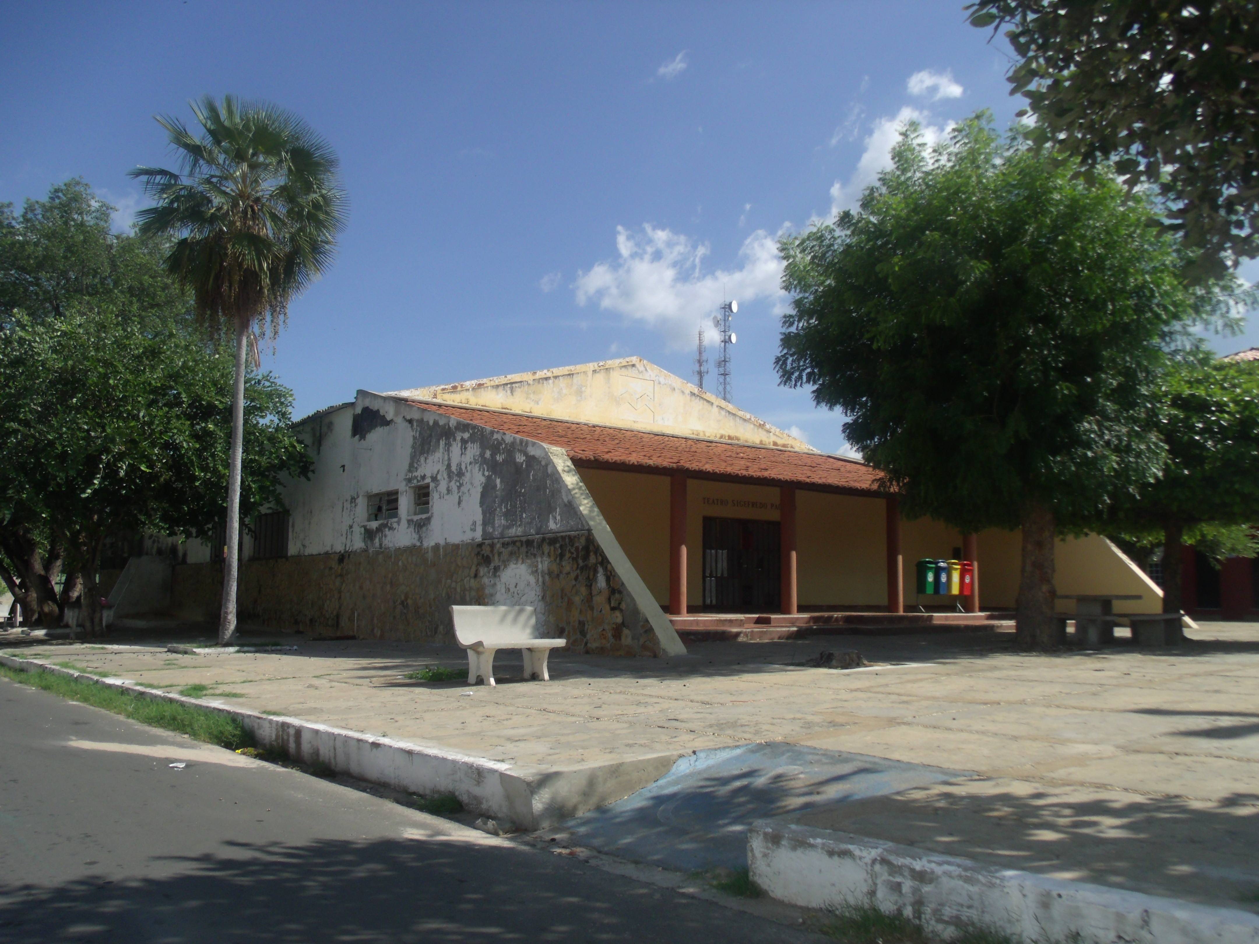 Vista externa do Teatro Municipal Sigefredo Pacheco, em Campo Maior, no Piauí.